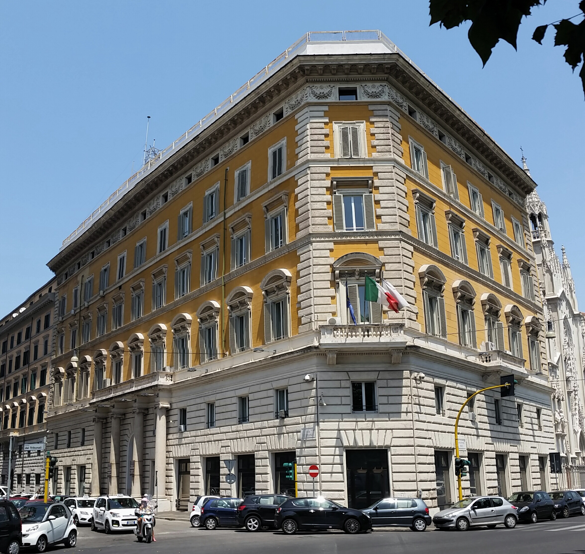 Sede del Dipartimento della Protezione Civile a Roma